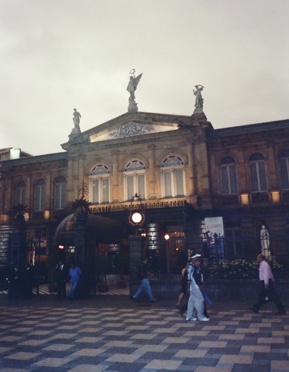 Fotografía del Teatro Nacional de San José, Costa Rica